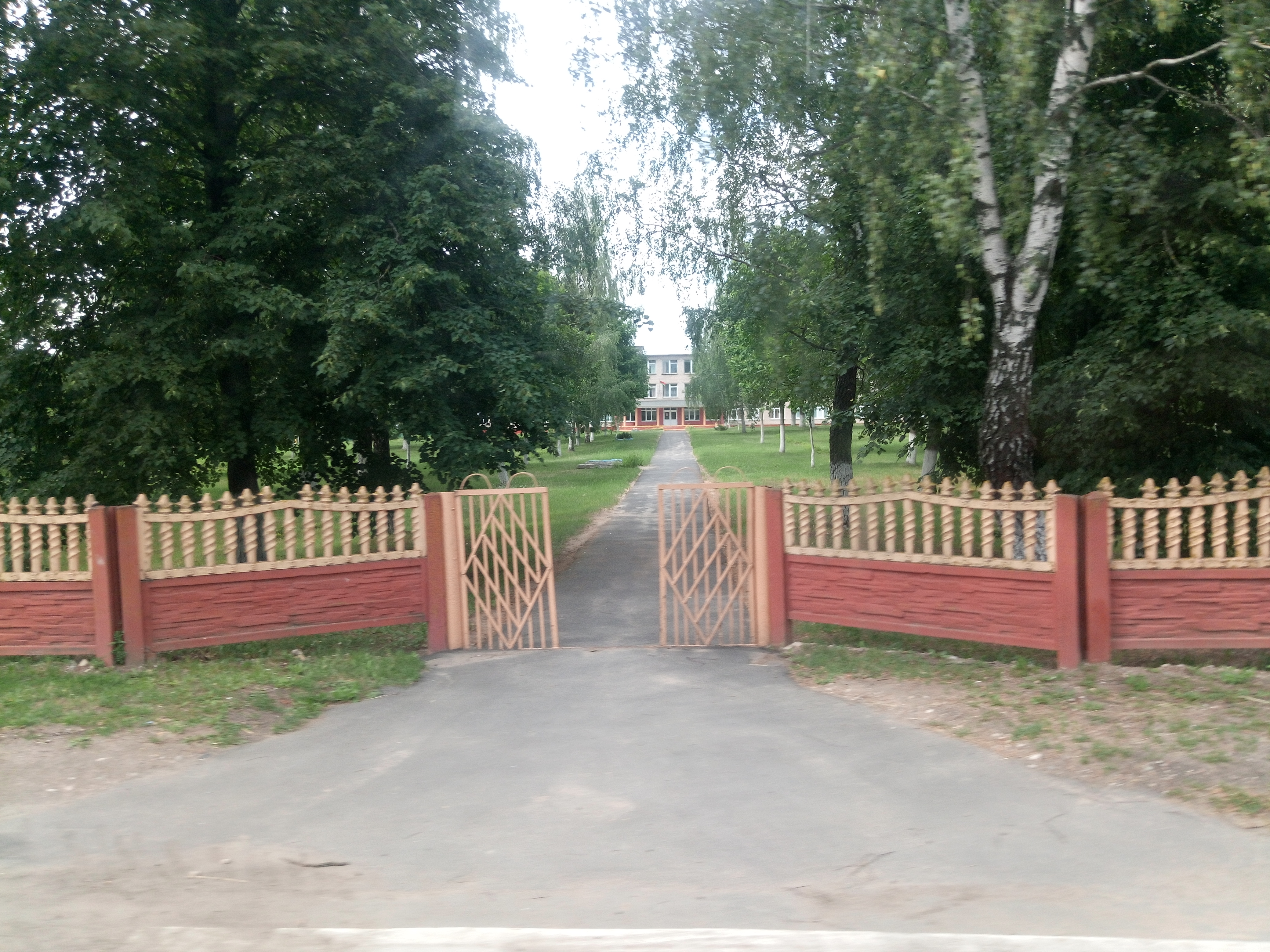 Дрычынскі яслі-сад Пухавіцкага раёна